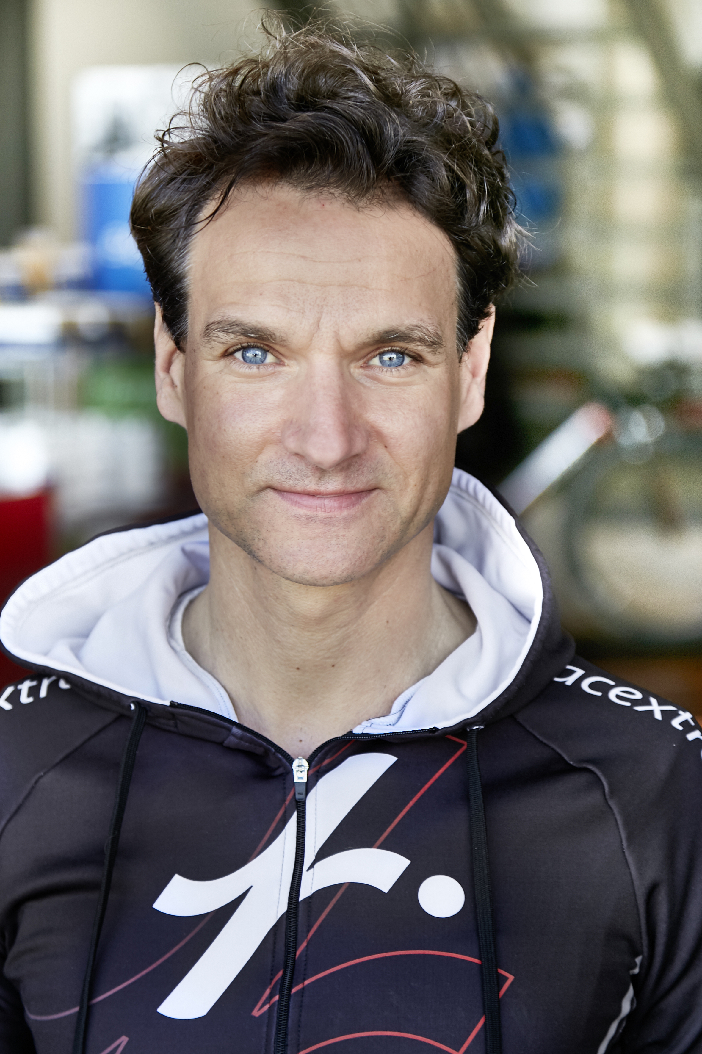 Jörg Scheiderbauer